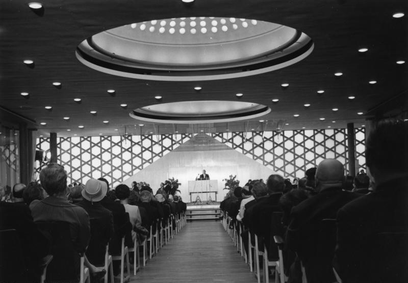 West-Berlin: Jüdisches Gemeindehaus, Fasanenstraße